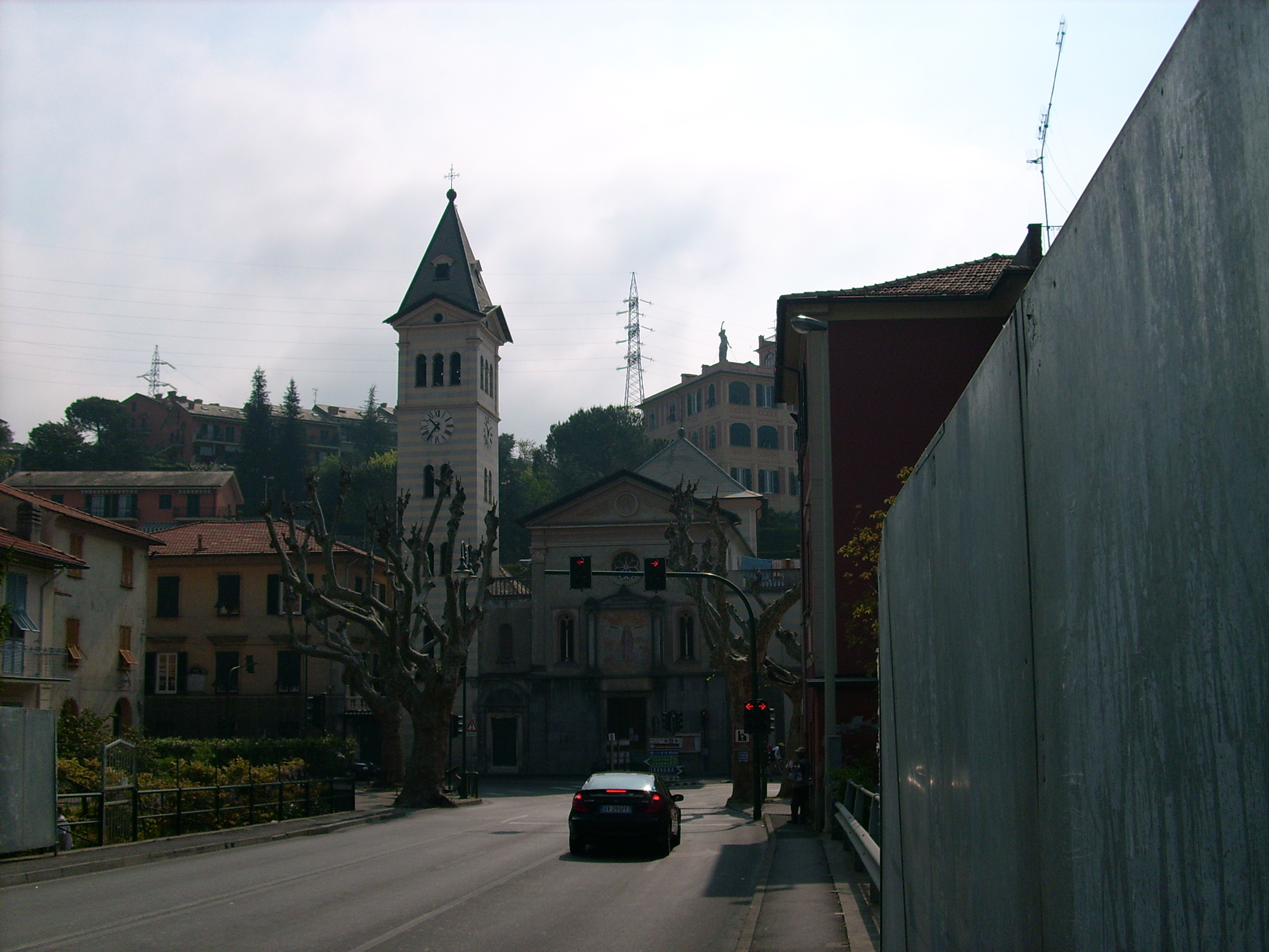 Santuario di Nostra Signora del Ponte di Lavagna, Liguria, Italia